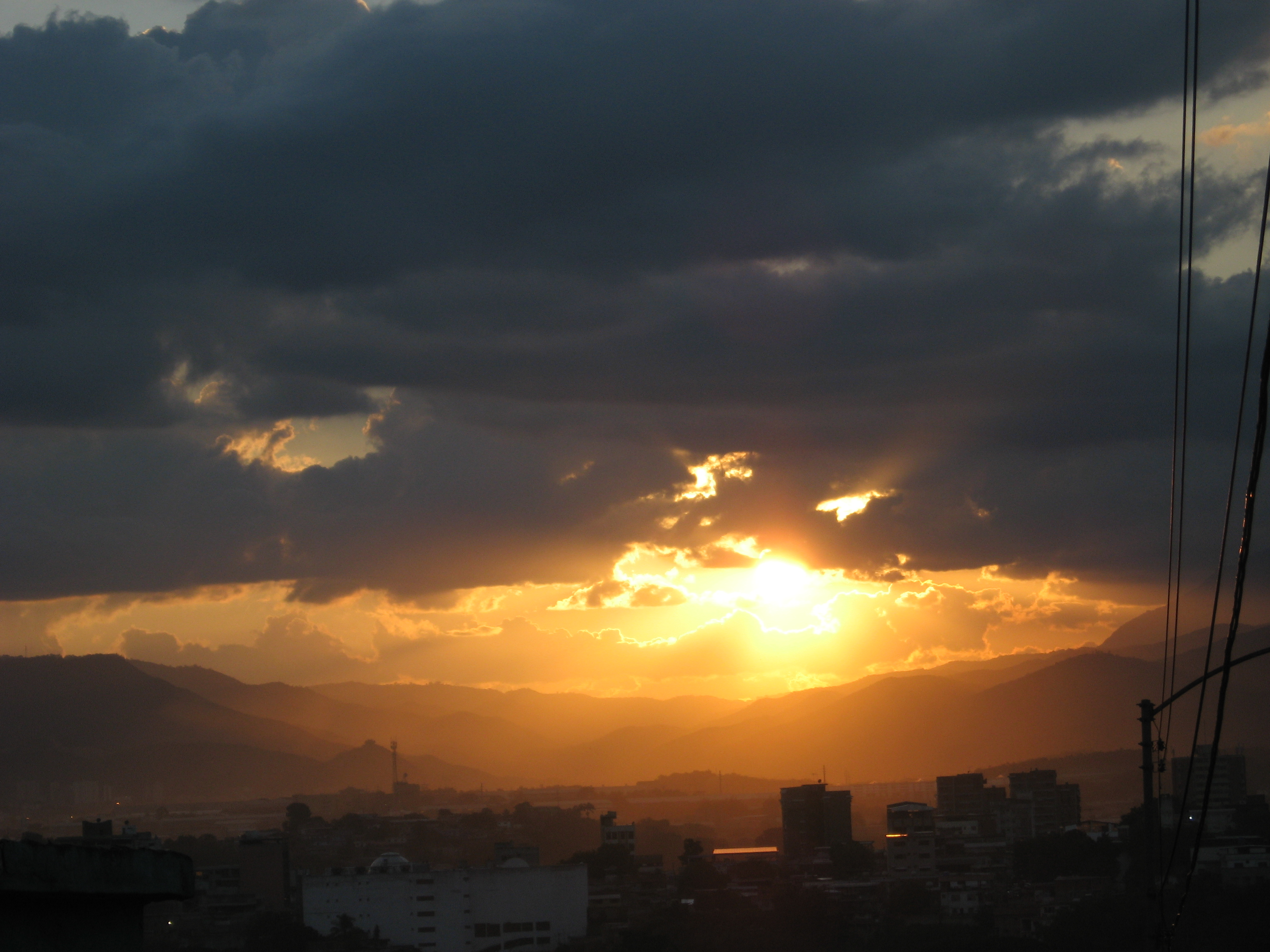 Hermosa vista del valle en un atardecer